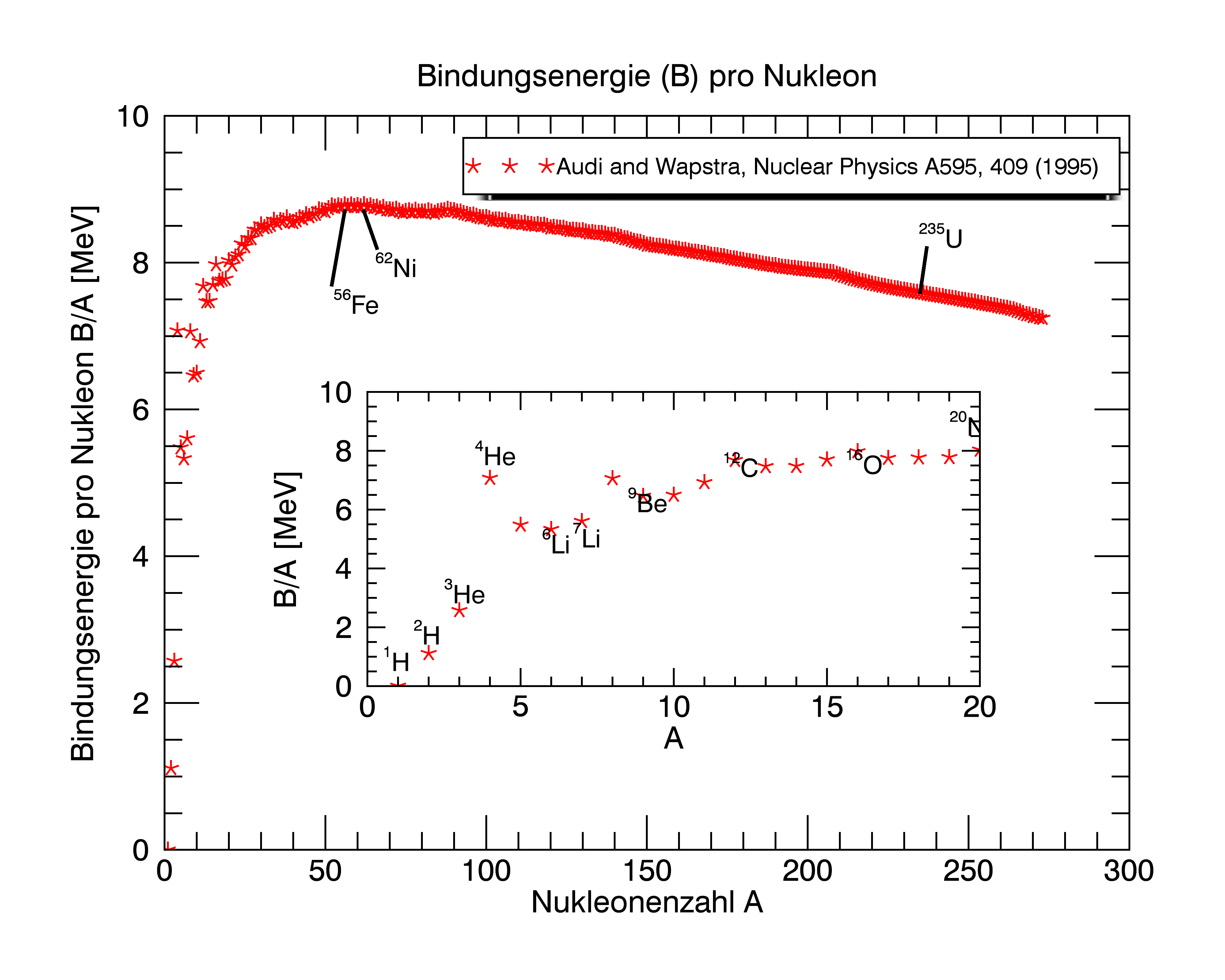 Bindungsenergien pro Nukleon in Abhängigkeit von der Nukleonenzahl im Kern. Die Daten stammen von Audi und Wapstra, Nuclear Physics A595, 409 (1995). Bei Nukliden mit gleicher Massenzahl wurden diejenigen mit der höchsten Bindungsenergie pro Nukleon ausgewählt. Ausnahme davon sind 3-He statt 3-H und 14-N statt 14-C. Die Ausgangsdaten für die Grafik entstammen einer Tabelle von Gordon Gilmore ( Direkter Link zur verwendeten Tabelle: Die Primärquelle der Daten in der xls Tabelle findet sich hier